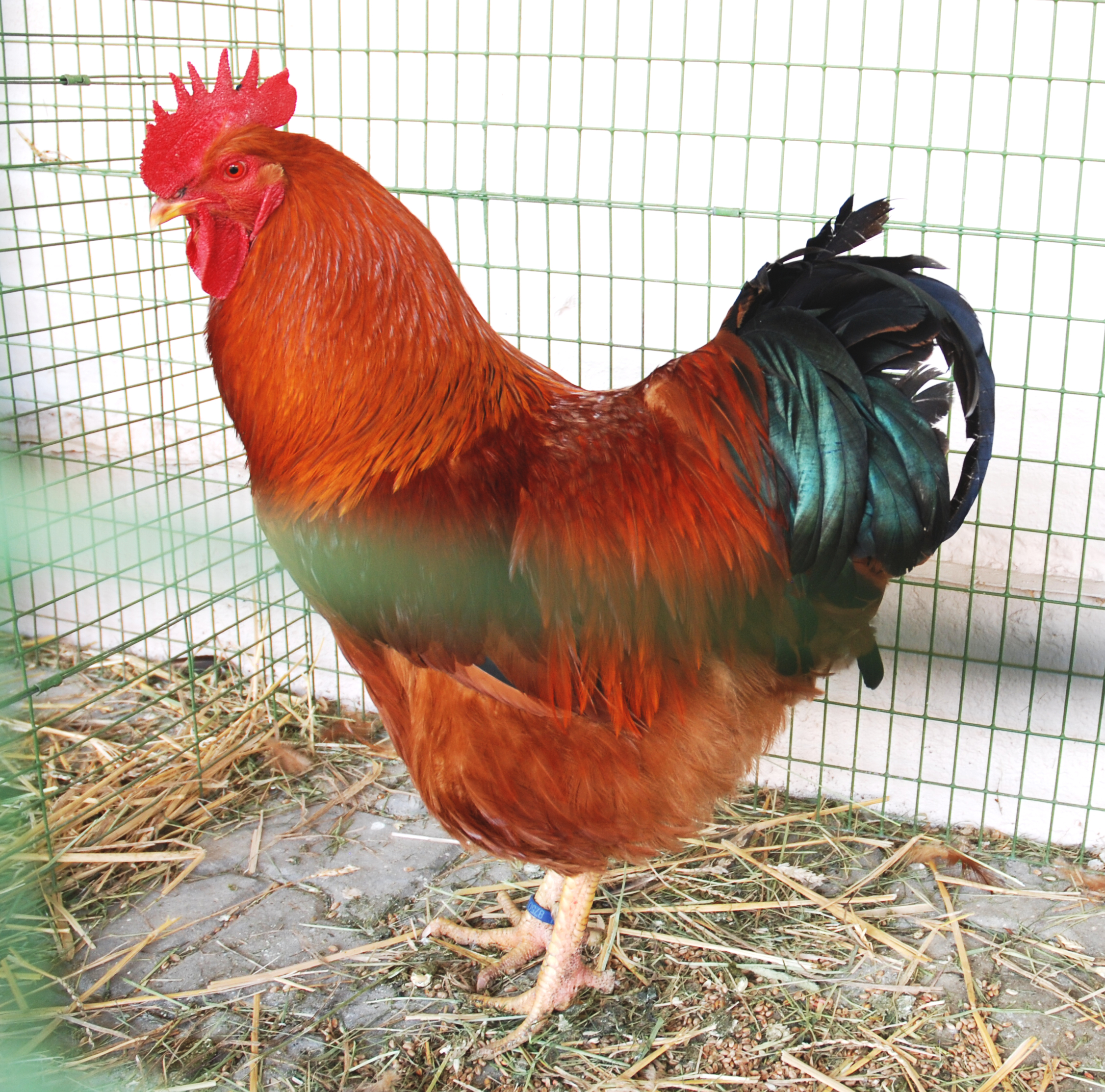 hempšírka kohout